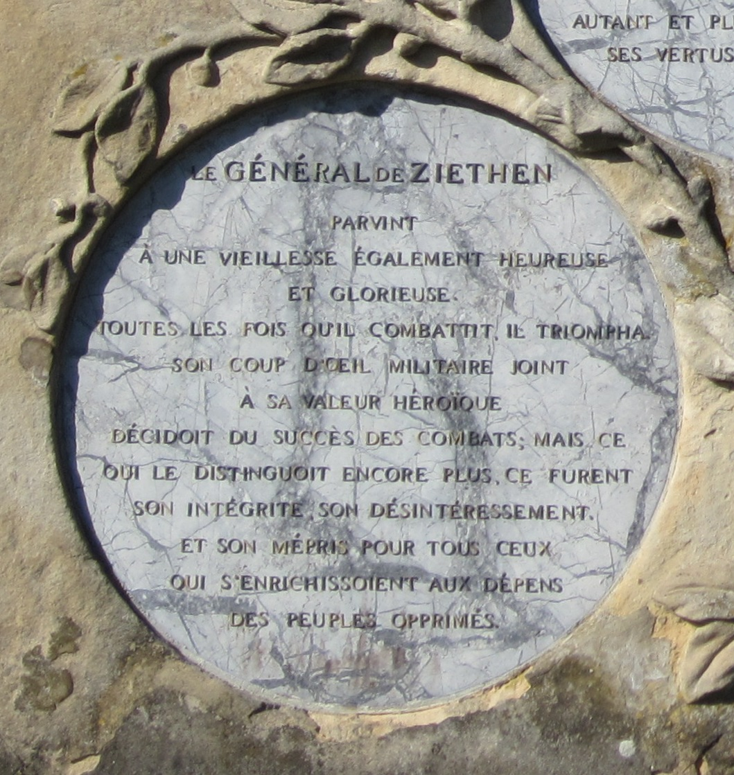 Tafel für Hans Joachim von Zieten (1699–1786) am Obelisken in Rheinsberg